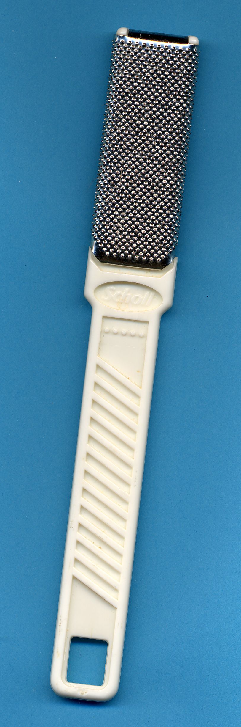 Hornhaut-Raspel